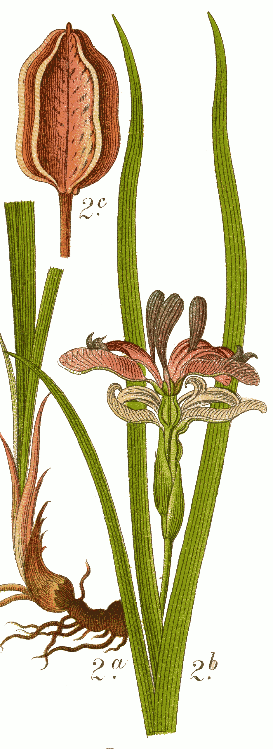 Original Caption Grasahnliche Schwertlilie, Iris graminea